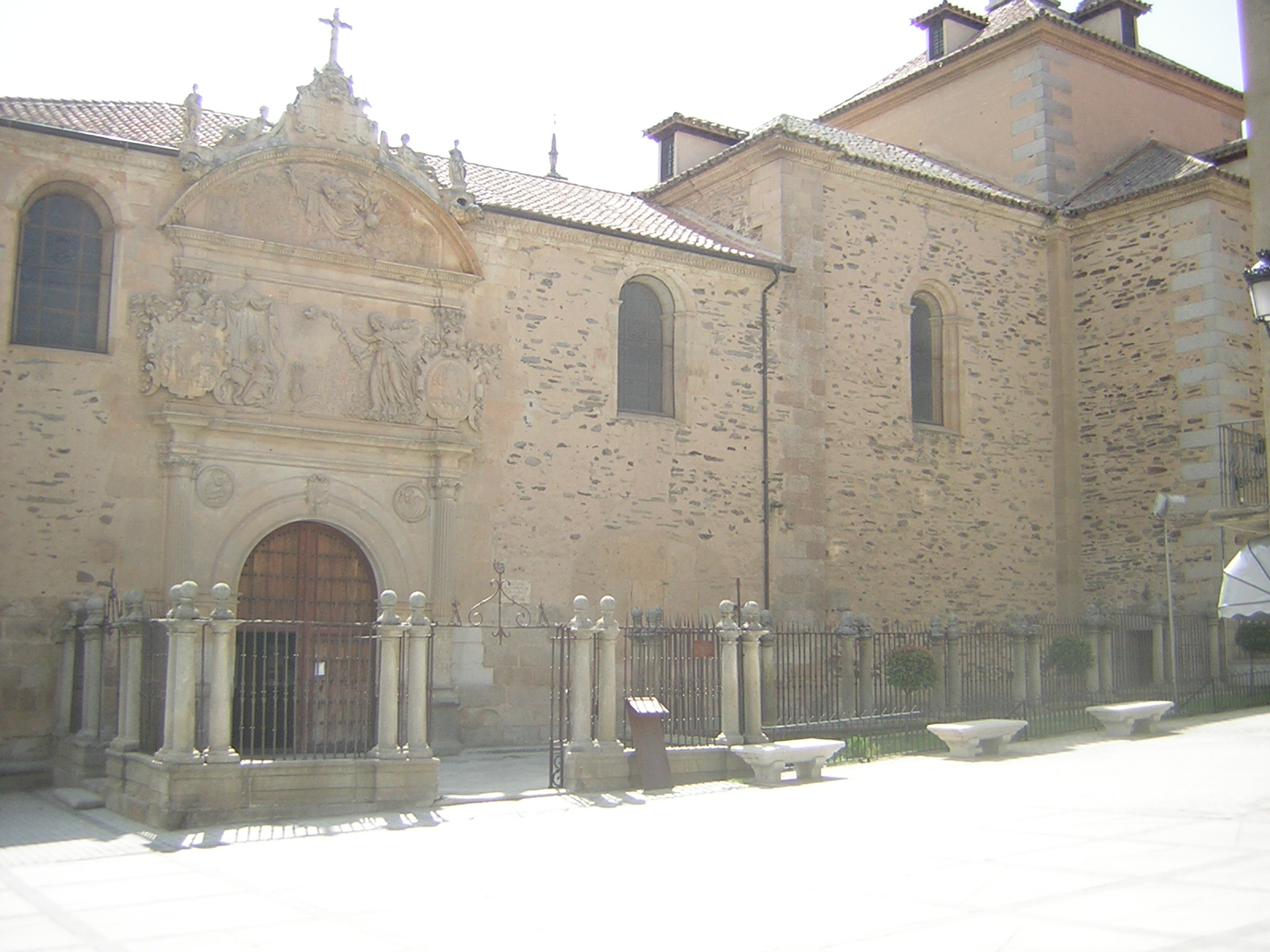 Convento de la Anunciación de Madres Carmelitas, Alba de Tormes.